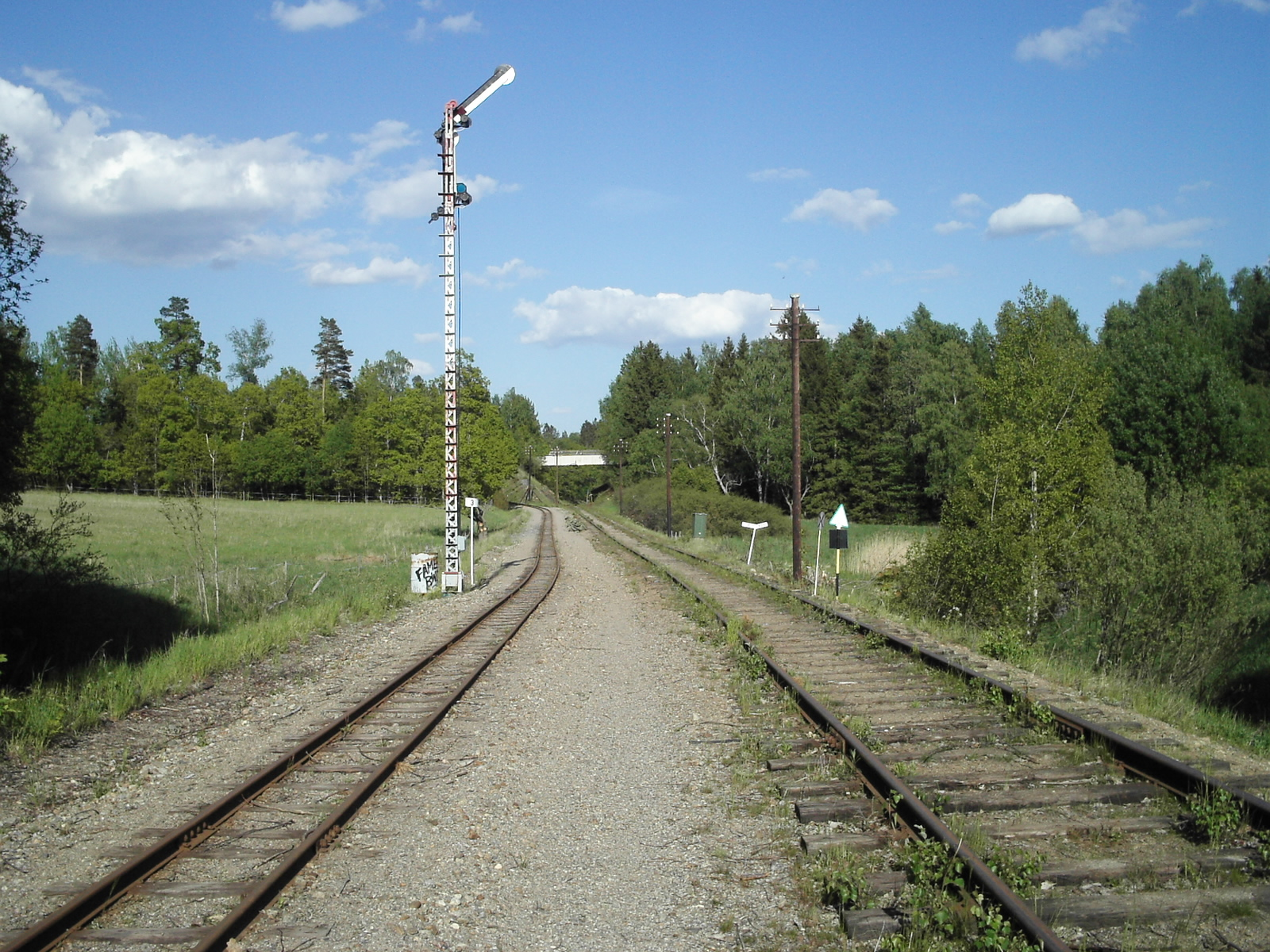 Semafor